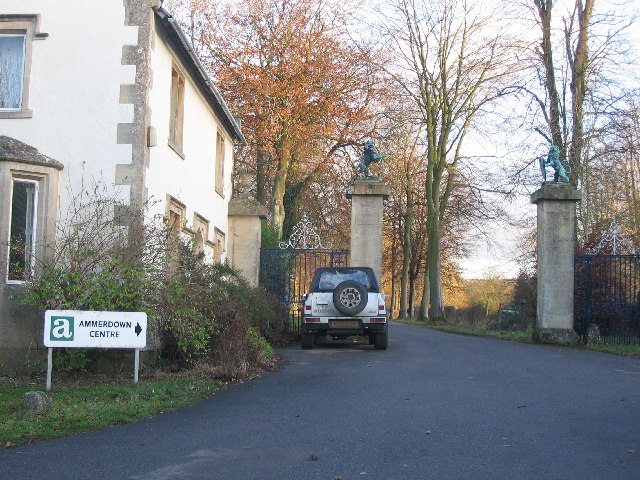 Ammerdown House in Kilmersdon, Somerset